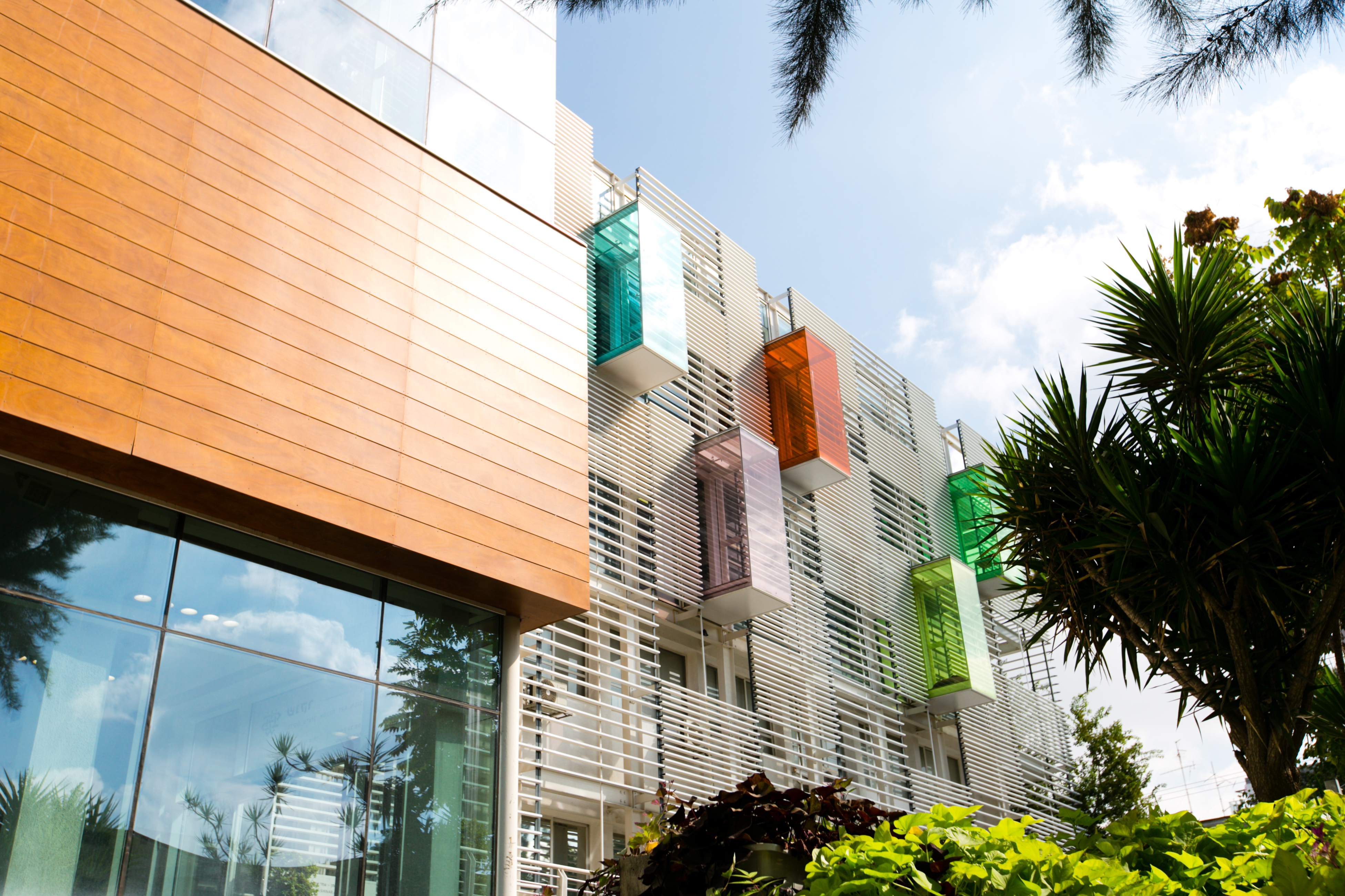 בניין פרניק, שנקר